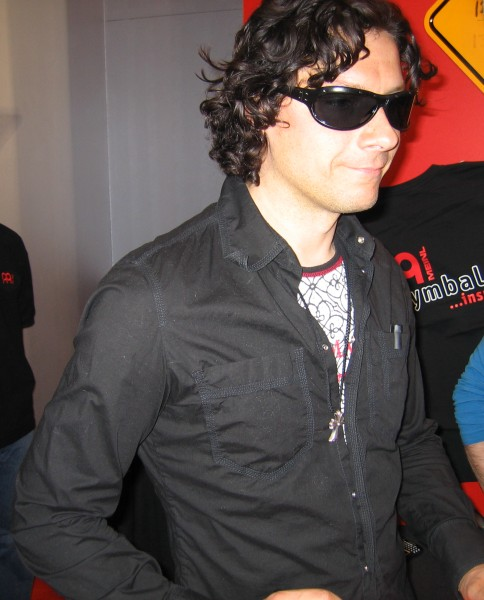 Rammstein-Schlagzeuger Christoph Schneider gibt Autogramme auf der Frankfurter Musikmesse 2005